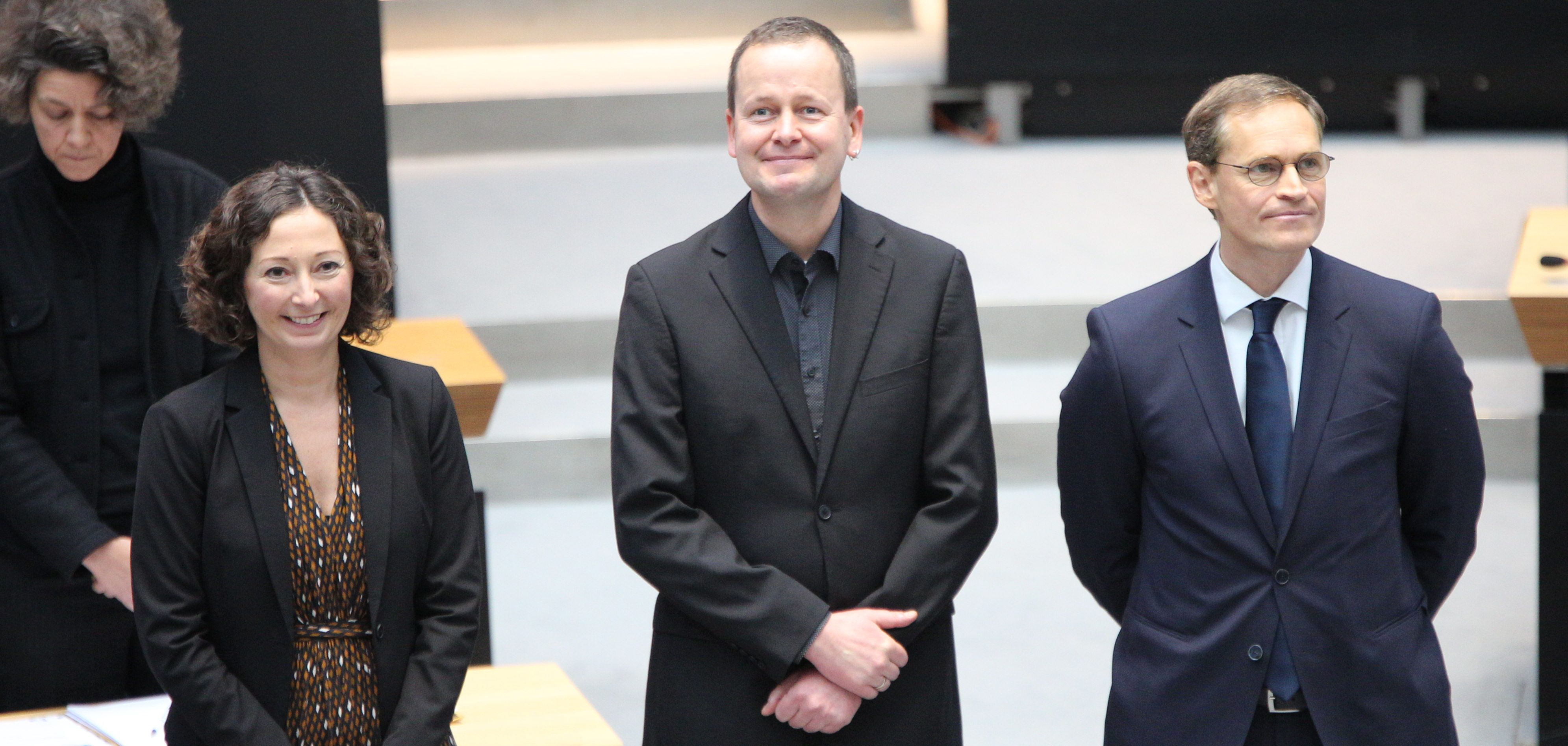 Michael Müller (SPD), Klaus Lederer (Die Linke) und Ramona Püp (Grüne); von rechts nach links